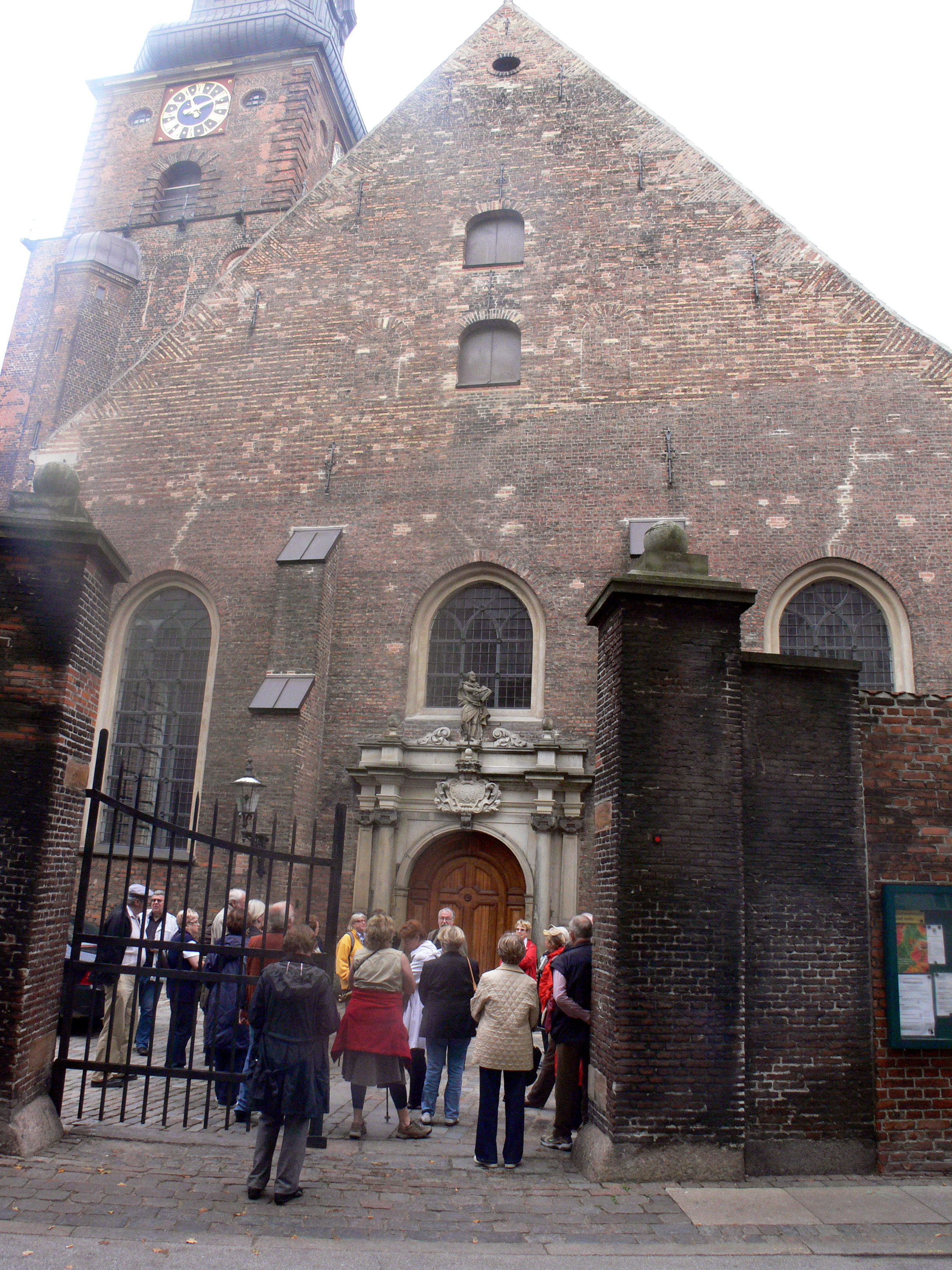 St. Peder Kirche in Kopenhagen